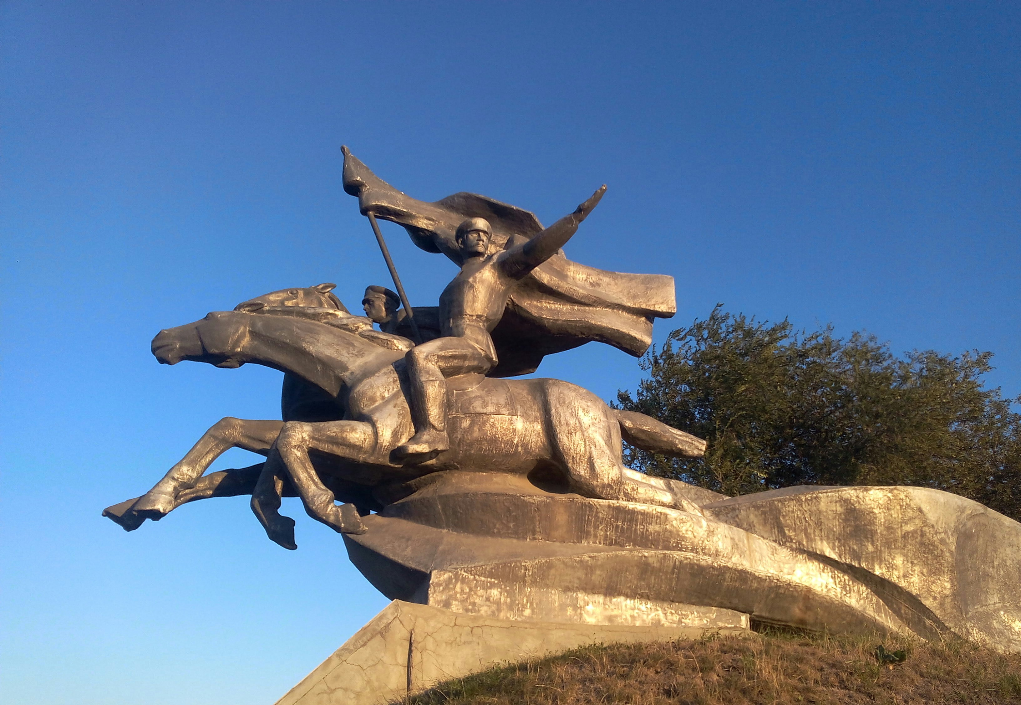 г. Сальск, памятник воинам 116-й дивизии (вид справа на памятник)